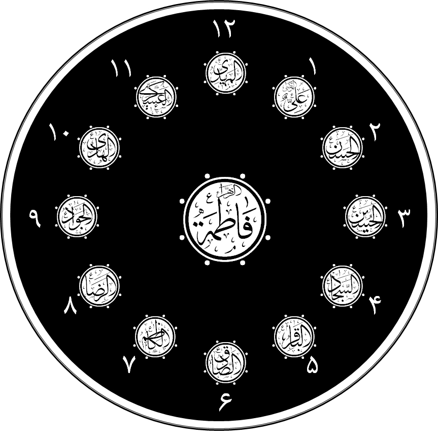 دوازده امام و حضرت فاطمه سلام الله علیه